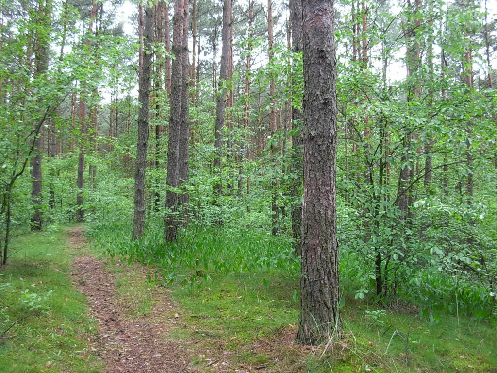 Puszcza Bydgoska